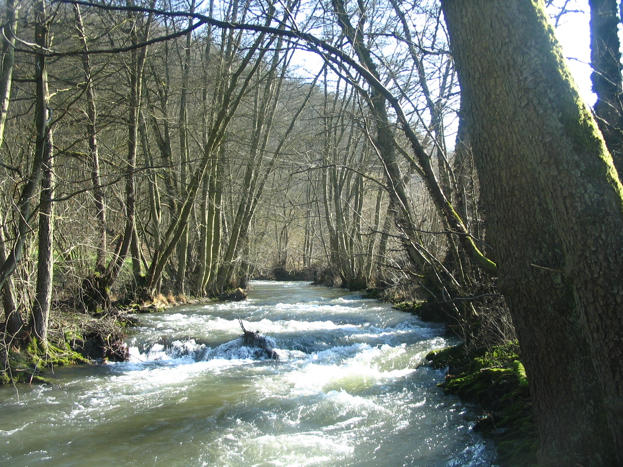 Flaumbach im Hunsrück